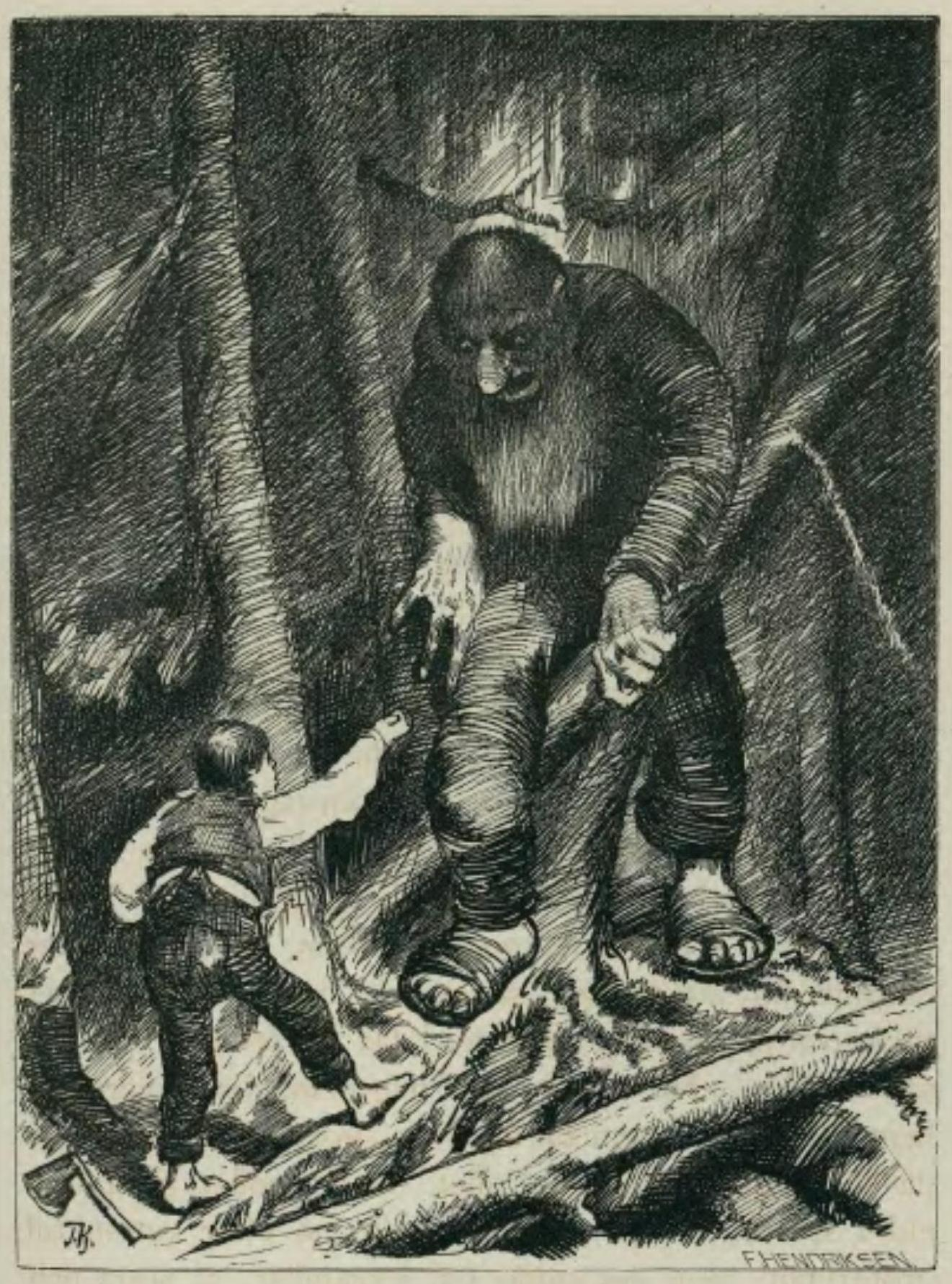 Sagobok för barn